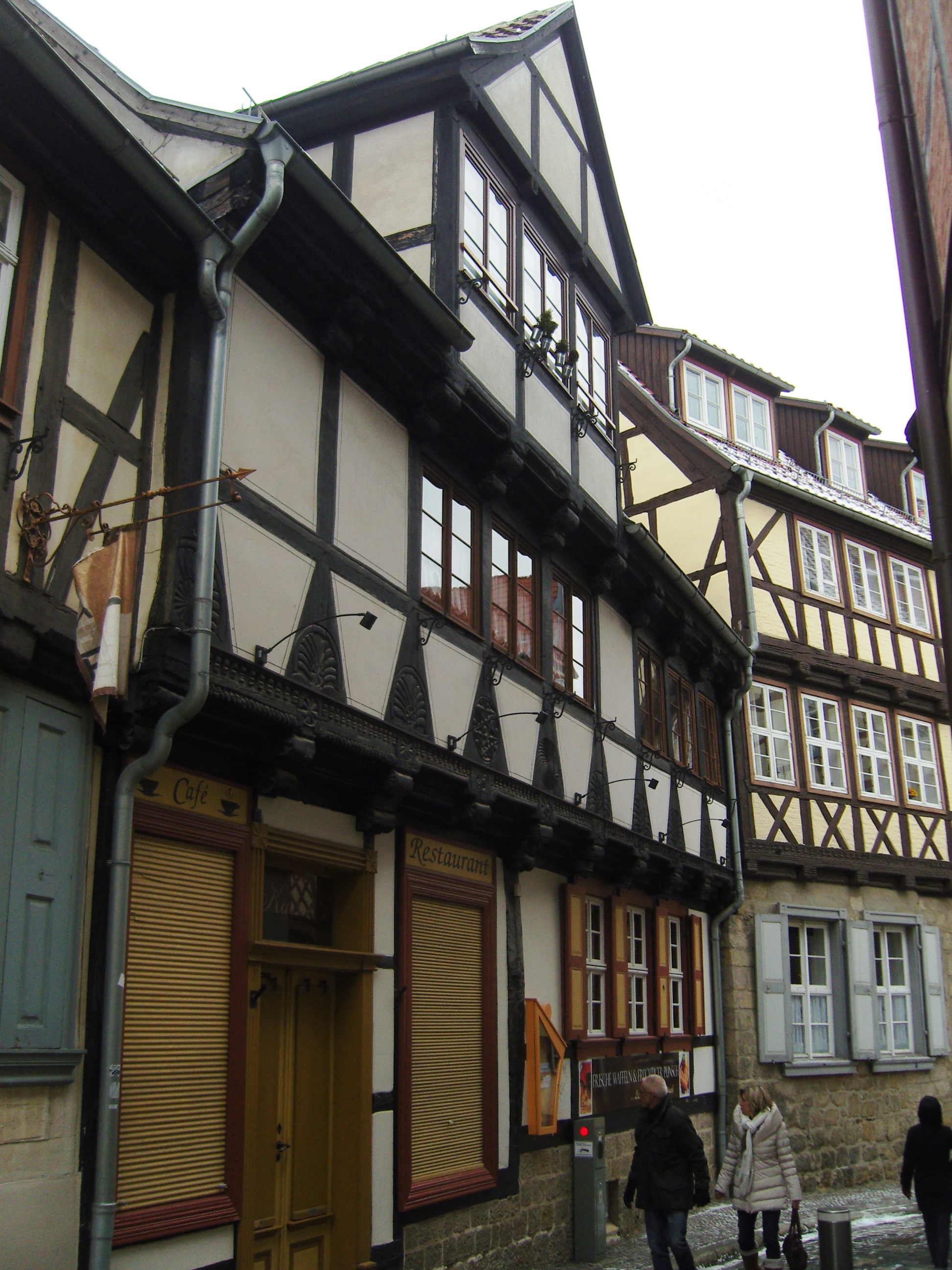 Denkmalgeschütztes Wohnhaus in der Langen Gasse 27 in Quedlinburg